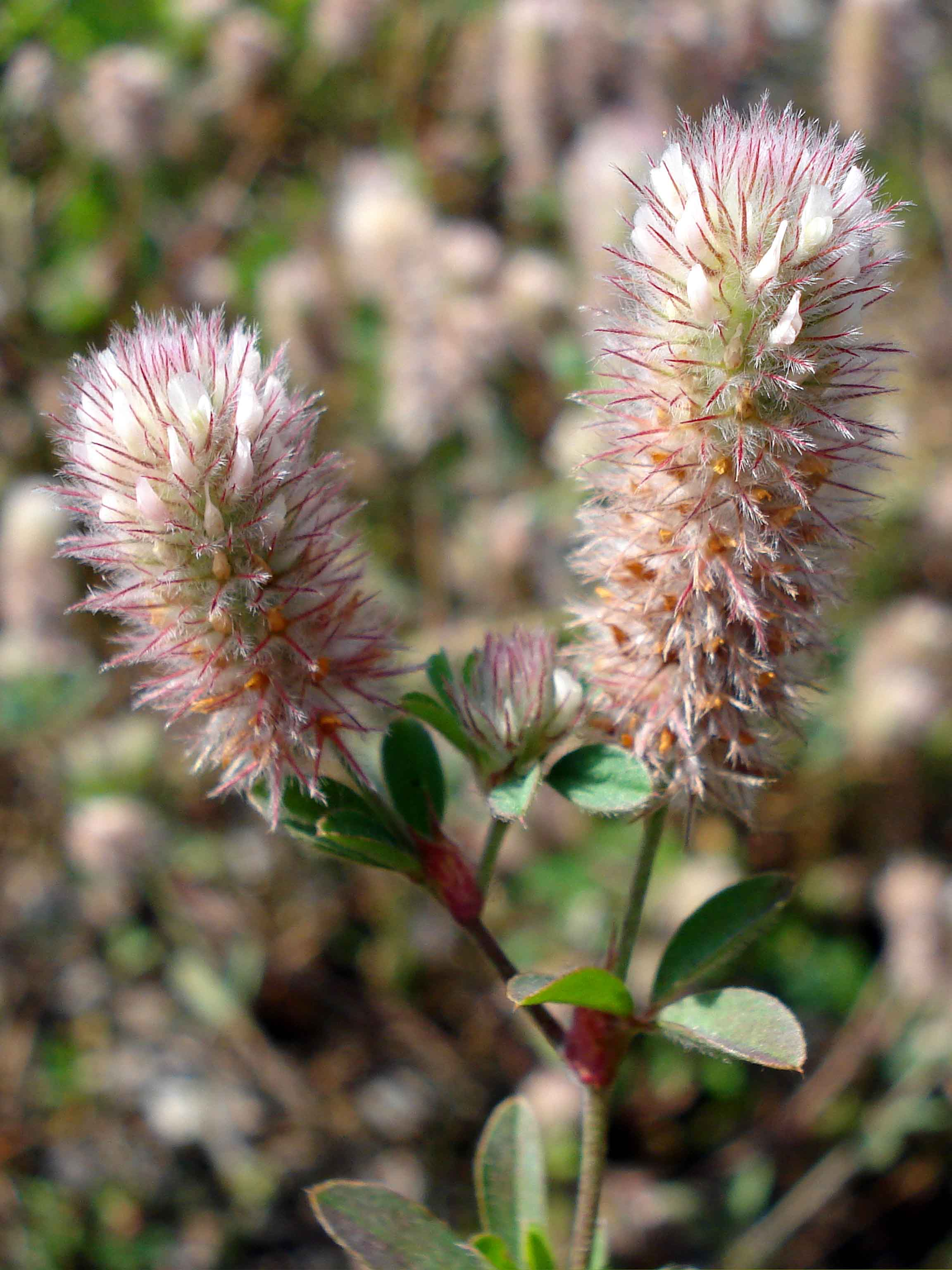 Trifolium arvense (Unterfranken, Germany)